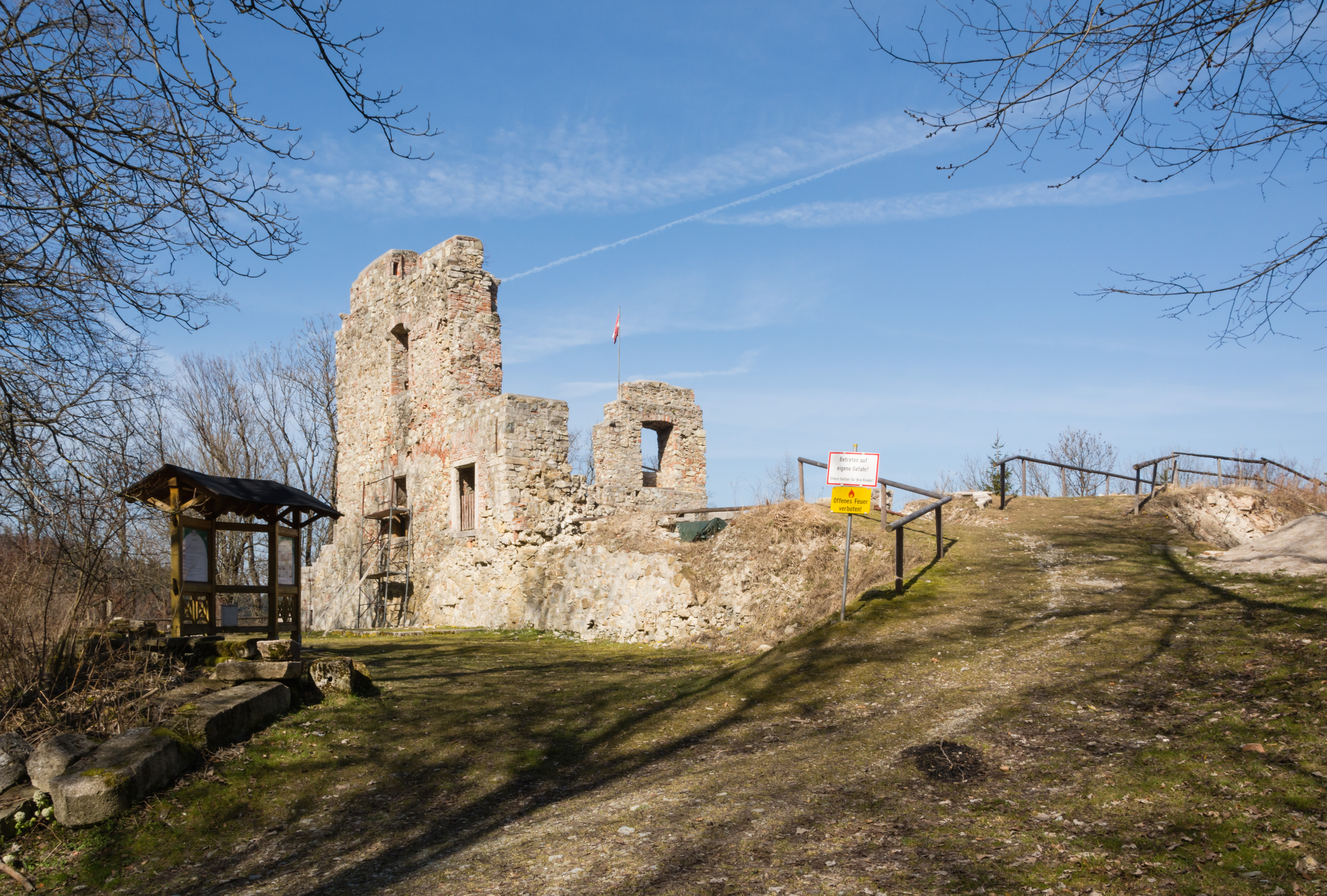 Schloss Seisenburg, Gesamtanlage mit Mauerresten u. Fundamenten